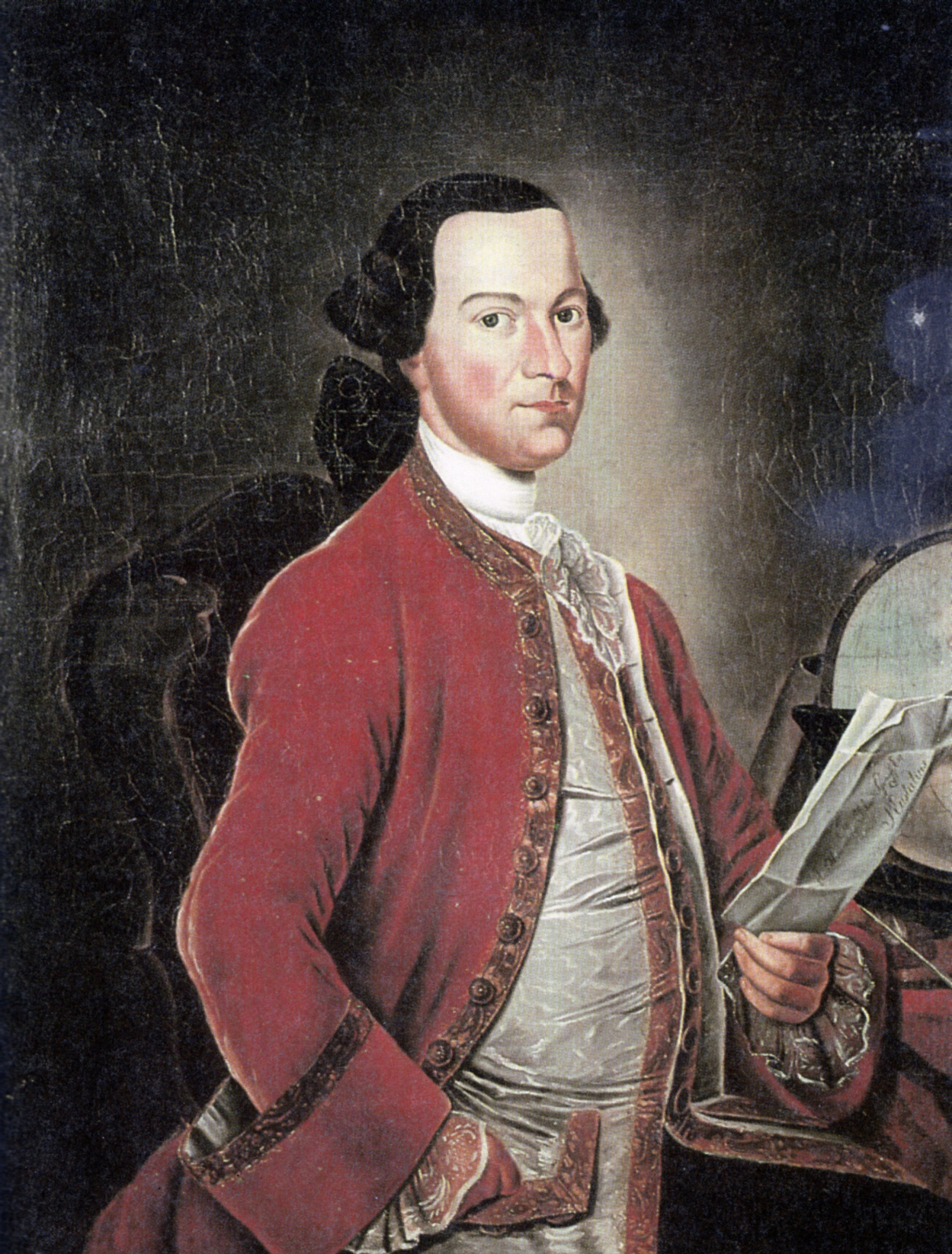 Johannes de Graeff, ook Johannes de Graaff (1729-1813), gouveneur van Sint Eustatius